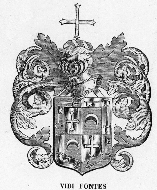 Wapenschild Blasivs de Bejar